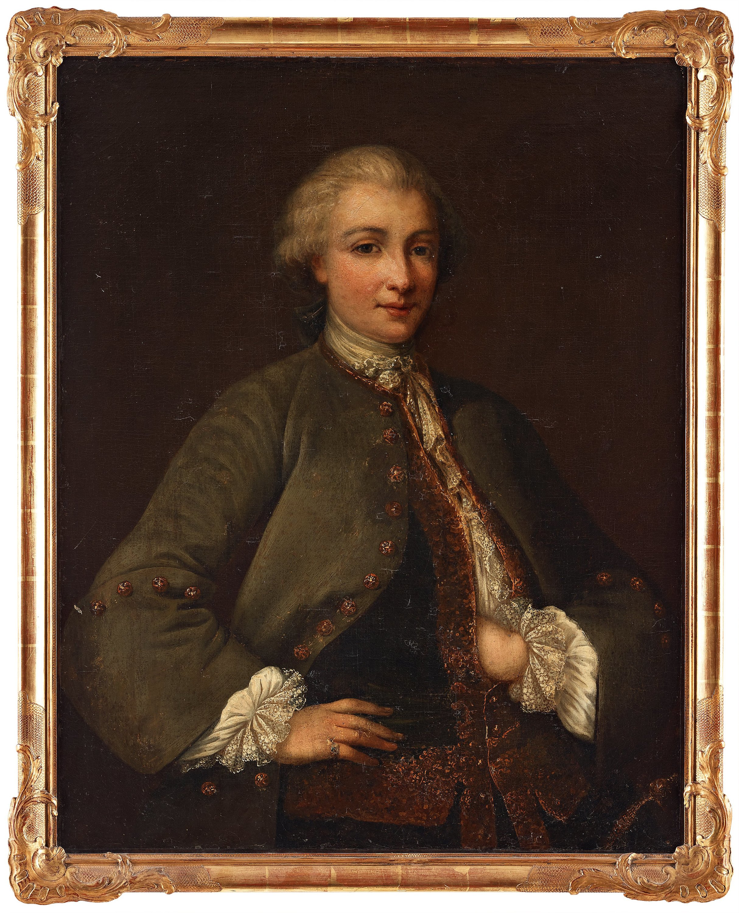 Kammarherren Carl Urban Hjärne (1703-1786). Avporträtterad ca 1750 av okänd konstnär.